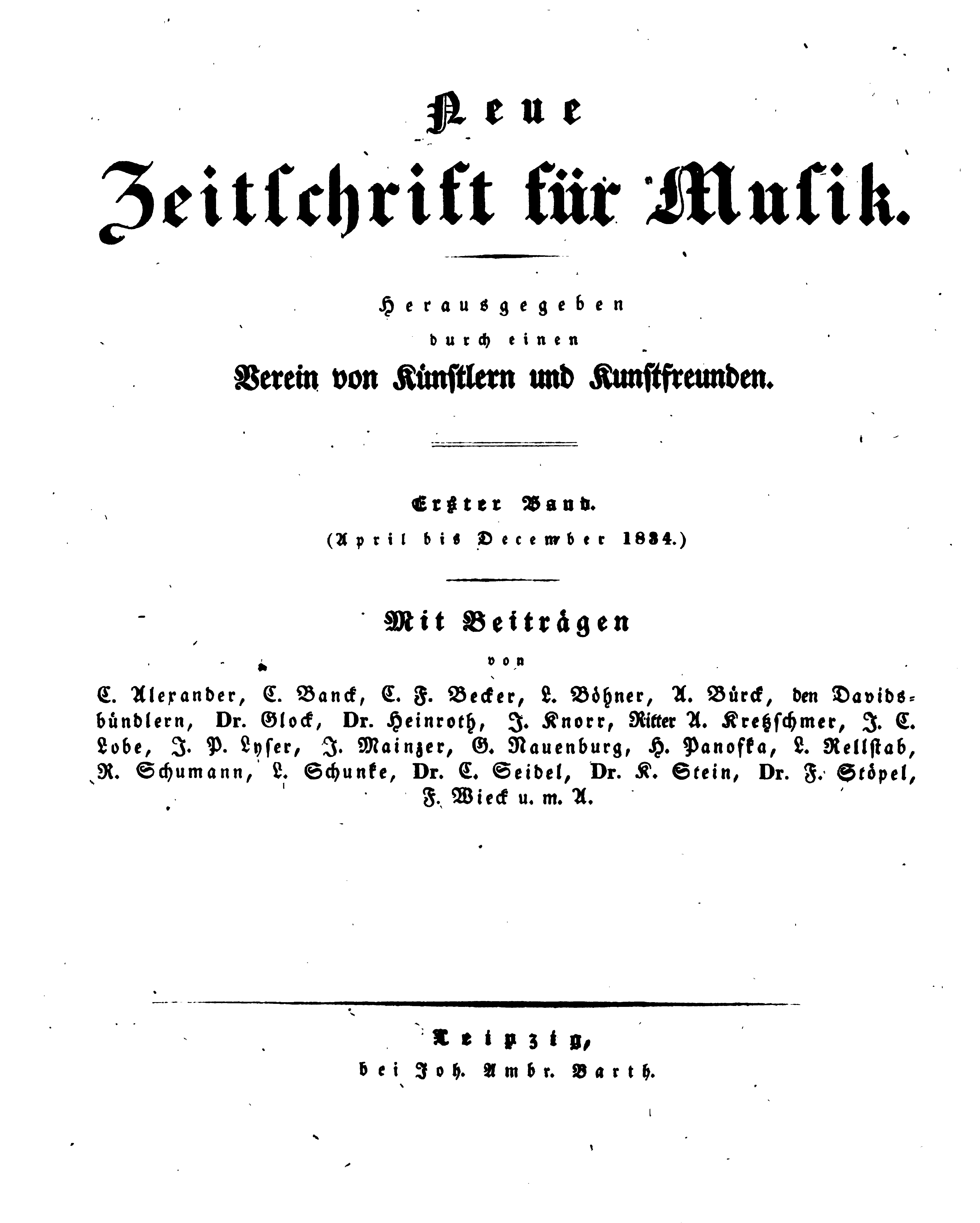 Titelblatt des ersten Jahrgangs der Neuen Zeitschrift für Musik, gegründet von Robert Schumann